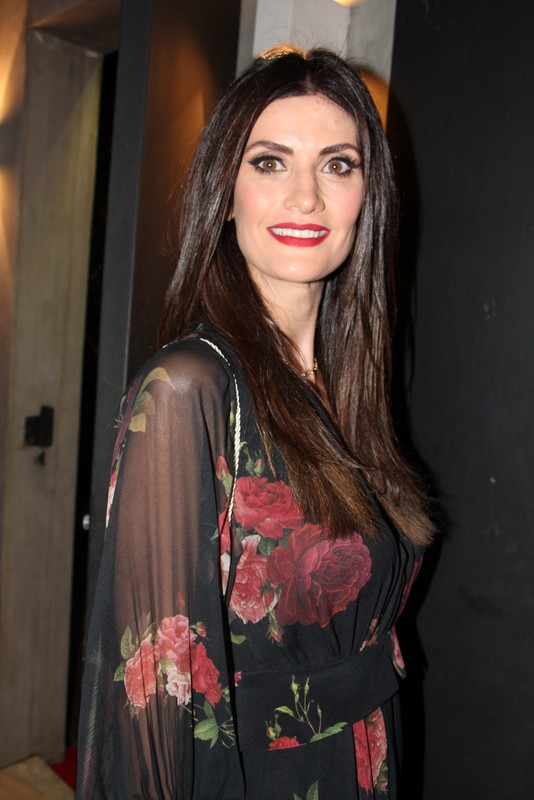 35 - Isabella Fiorentino